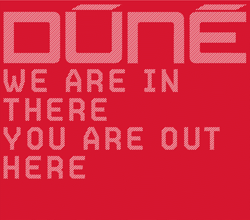 Coverart fra den tyske version af Dúnés album We Are In There You Are Out Here.